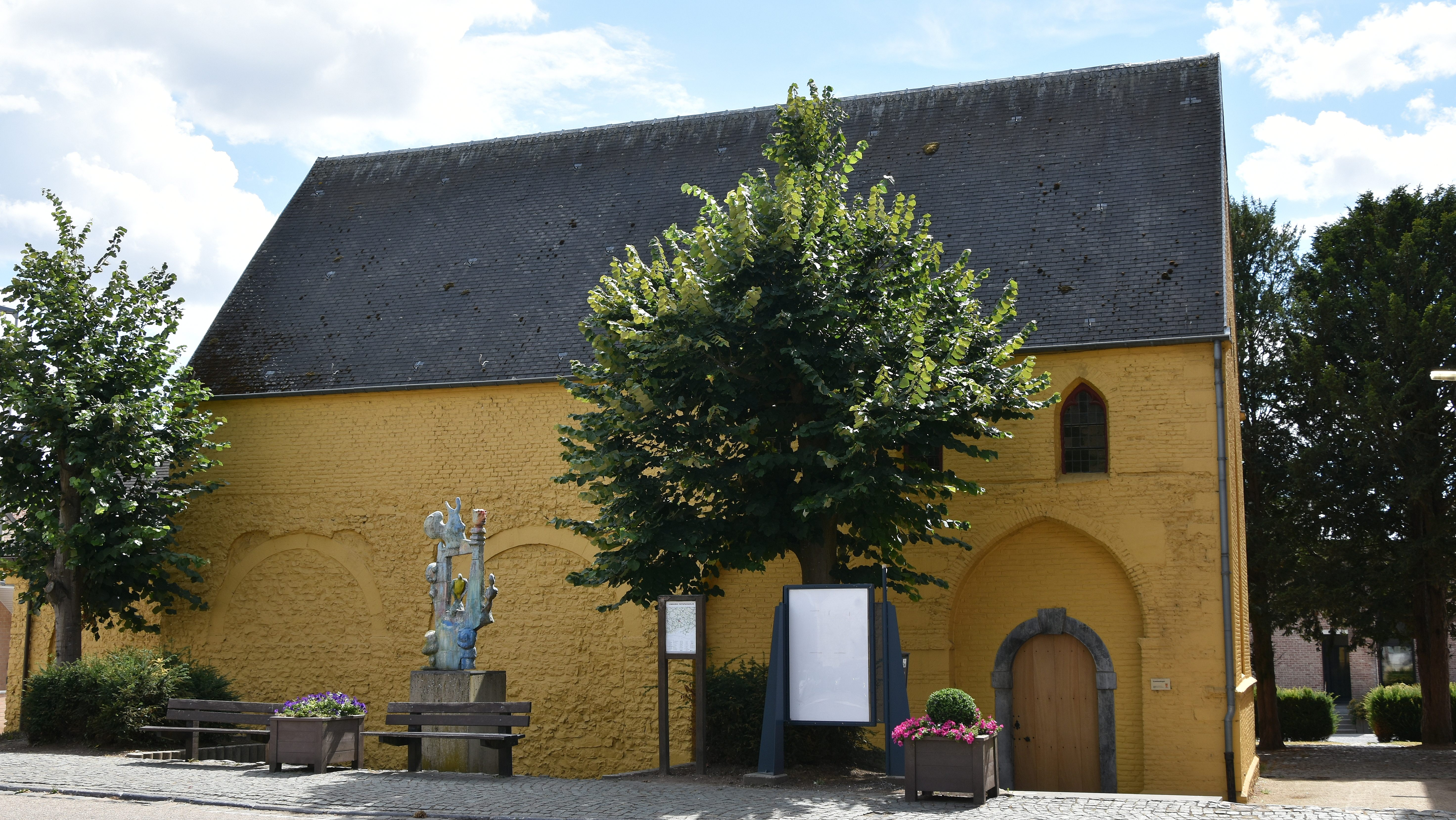 Graethemkapel Borgloon 10-08-2018 14-38-10 This photo of immovable heritage has been taken in the Flemish Region